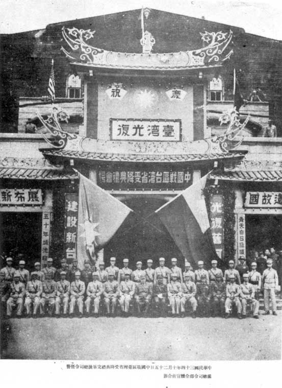 中文（台灣）: 1945年10月25日，臺北公會堂舉行「中國戰區臺灣省受降典禮」後，臺灣警備總司令部全體官兵合影。左半邊掛中國國民黨黨旗，右半邊掛中華民國國旗。